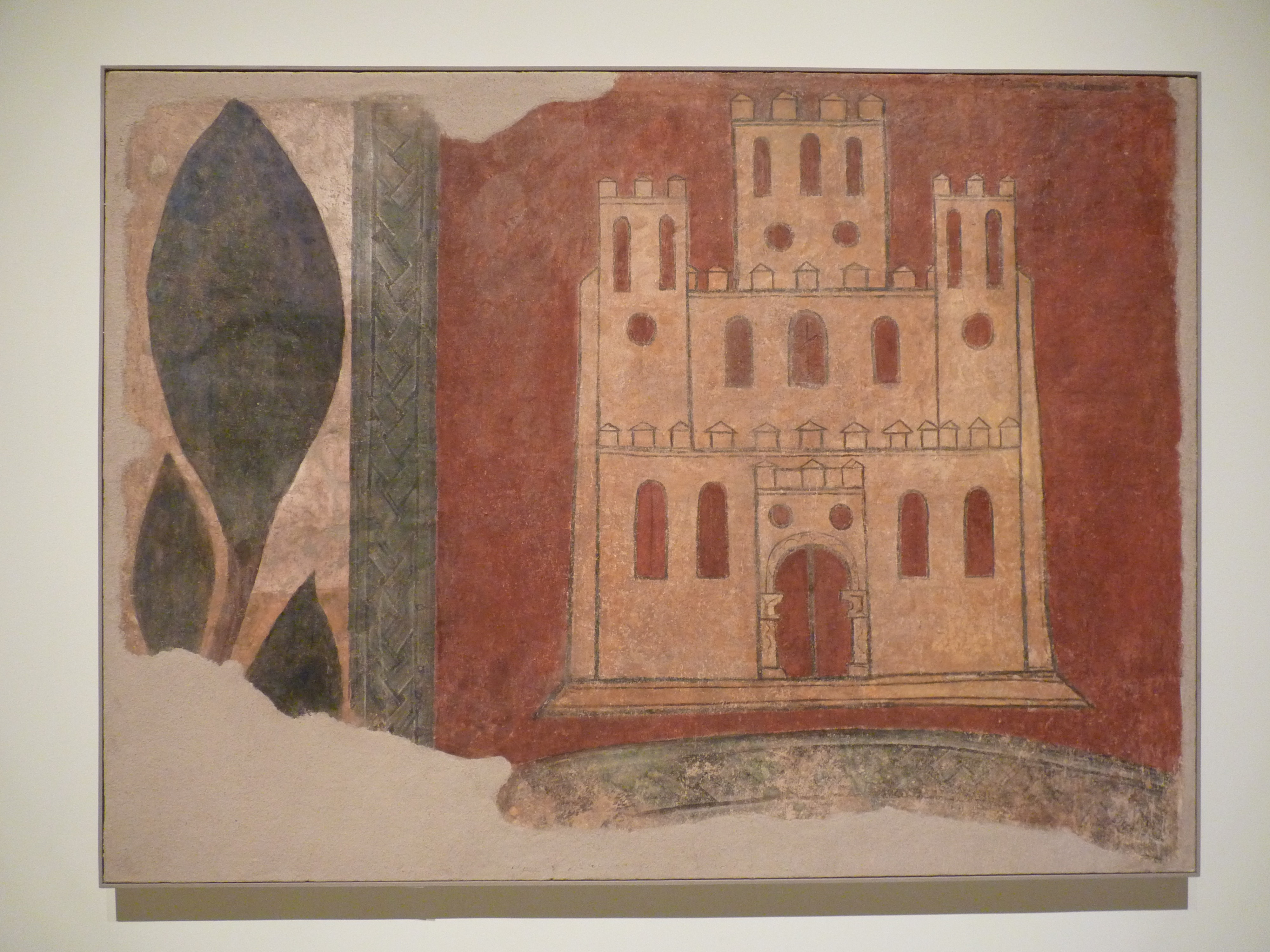 Pintures d'Arlanza: Castell. ANÒNIM. CASTELLA. BURGOS. Cap a 1210